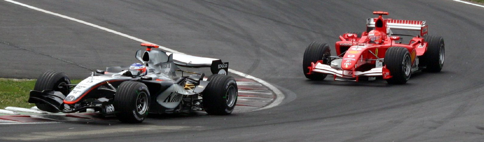 Kimi Räikkönen (McLaren, left) and Michael Schumacher (Ferrari, right)